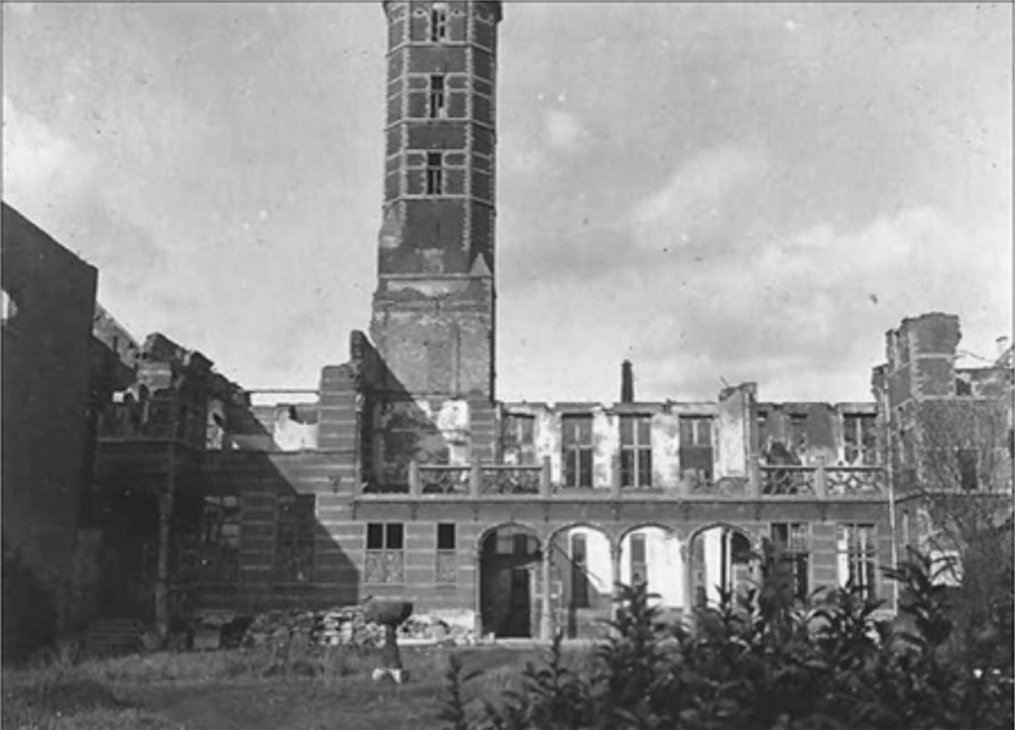 Het verwoeste Hof van Busleyden na de beschietingen van 1914.